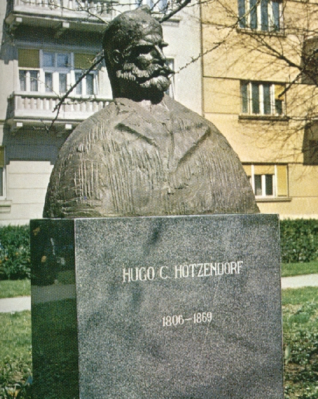 Hugo Conrad von Hötzendorf, slikar iz Osijeka (oko 1807-1869); autor kipa Vanja Radauš